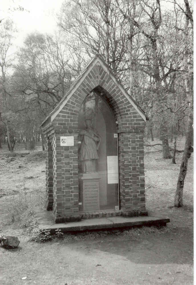 Das Häuschen von St. Johannes (Häuschen von Jans Boms Steen), ein beliebter Wanderertreffpunkt in der Haard im Kreis Recklinghausen, Nordrhein-Westfalen